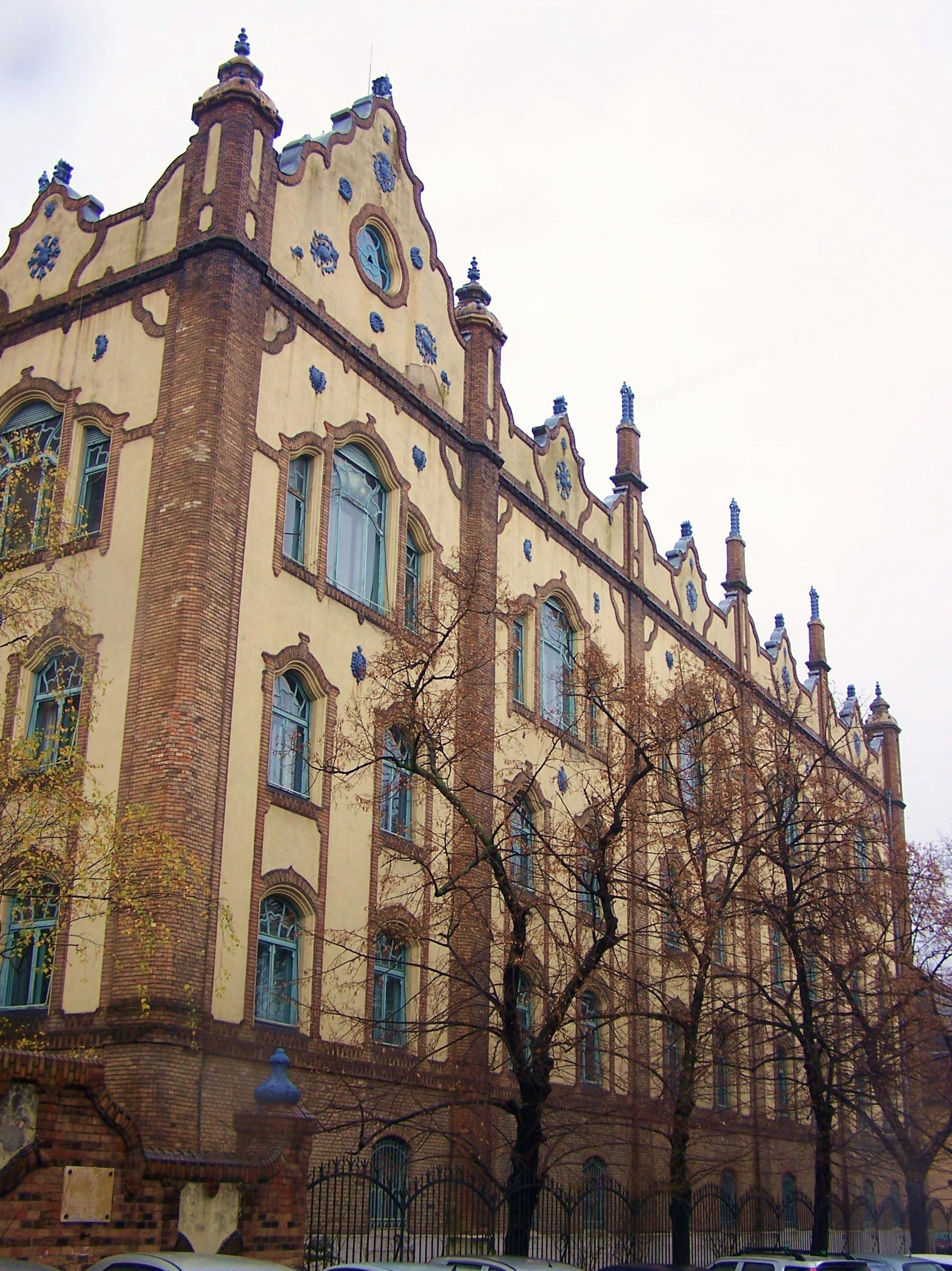 Földtani Intézet (Budapest 14, Stefánia út 14., Szabó József köz 2.) This is a photo of a monument in Hungary, Identifier: 1231